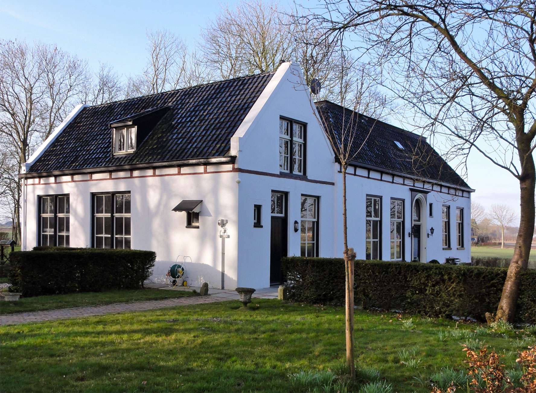 Hervormde pastorie van Breede